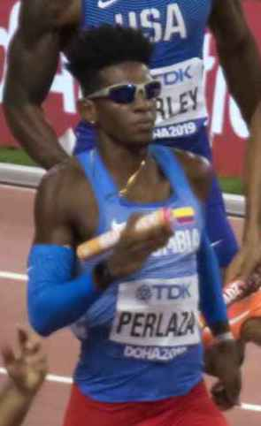 DOH90194 4x400m men final sacoor